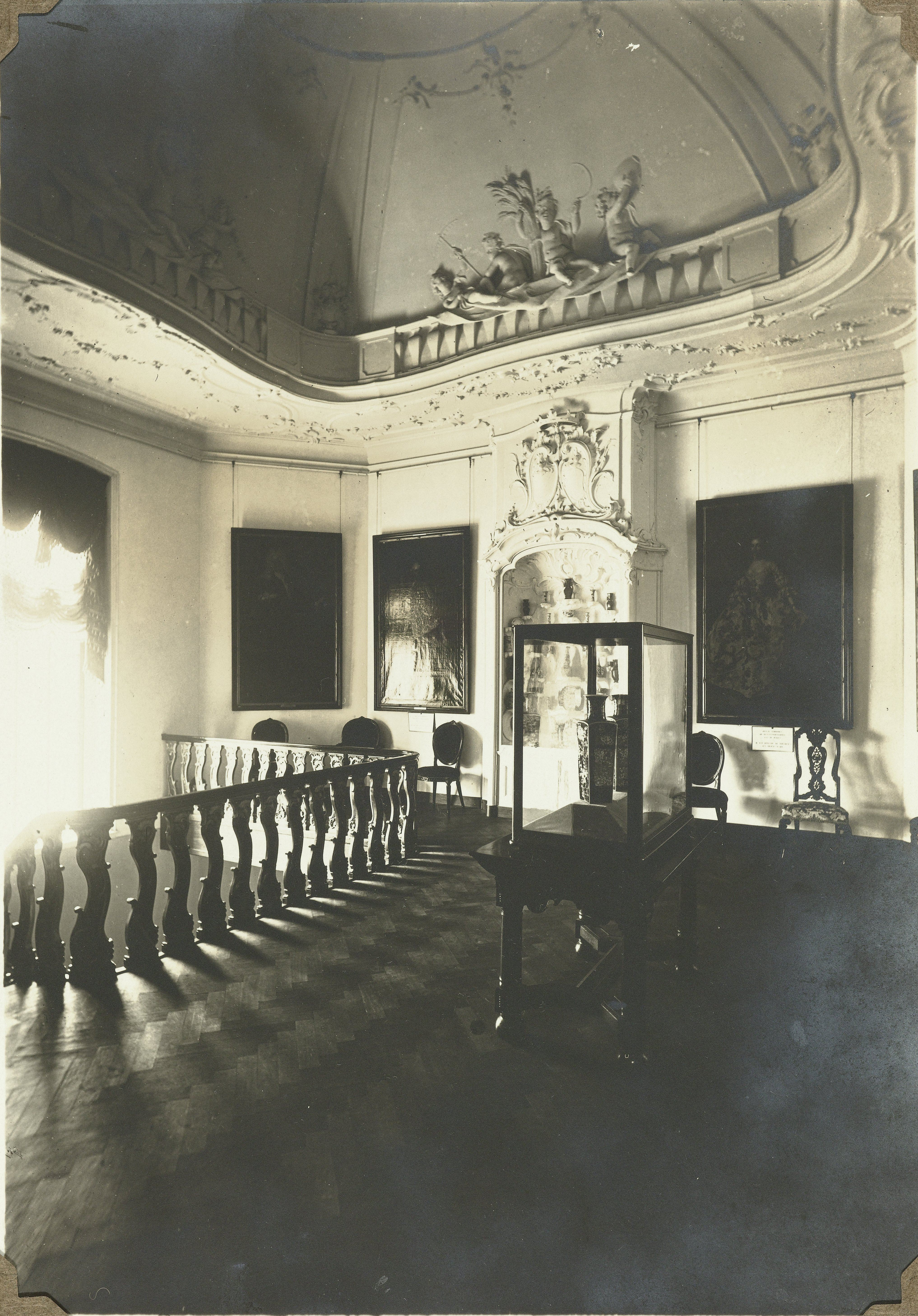 Druckeruitbouw zaal 364 De hal, het 'Rotterdams koepelportaal', vormde de verbinding tussen het Fragmentengebouw en de Druckeruitbouw. In de hal is in 1905 een rococo trappenhuis, afkomstig uit een gesloopt Rotterdams herenhuis, geplaatst. In 1923 is de hal gerenoveerd waarbij onder andere de Lodewijk XV koepel is hersteld, de traphelling flauwer gemaakt, door het eigen personeel, en wandvitrines zijn gemaakt. Bij de laatste restauratie, 1994-96, is de oorspronkelijke traphelling weer hersteld. Hal is gebouwd in de Louis XV stijl. Het stucadoorwerk, de vier jaargetijden voorstellende, en de betimmering zijn overgebracht uit een koepel aan de Schiekade te Rotterdam. Zicht op drie grote 18de eeuwse portretten van Verheyden. In een ingebouwde kast is porselein uit het Nederlandsche Museum opgesteld. In een vitrine zijn twee Chinees porseleinen vazen uit de collectie van de familie Drucker te zien.